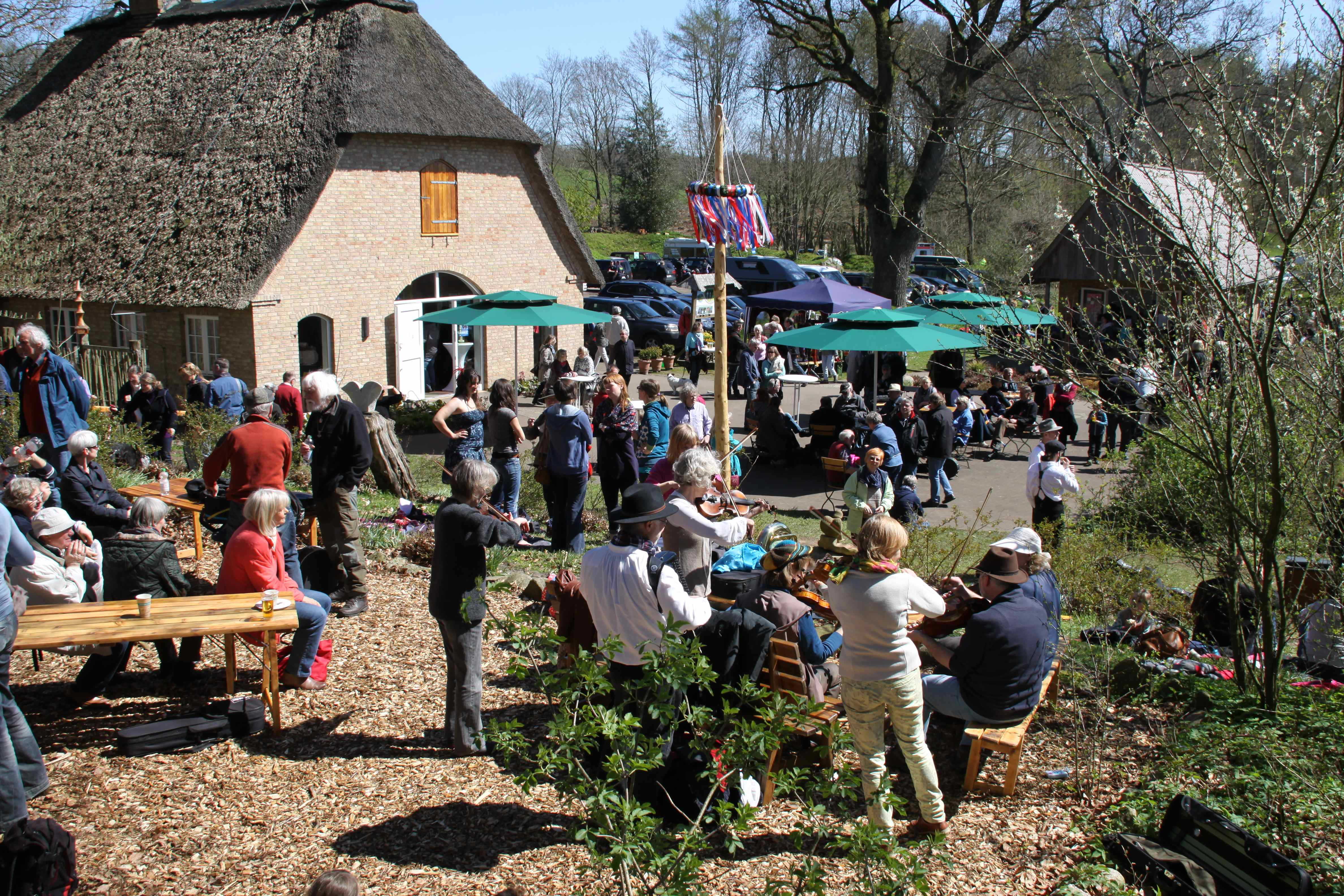 Maifolk-Fest im Kolonistenhof Neu Duvenstedt